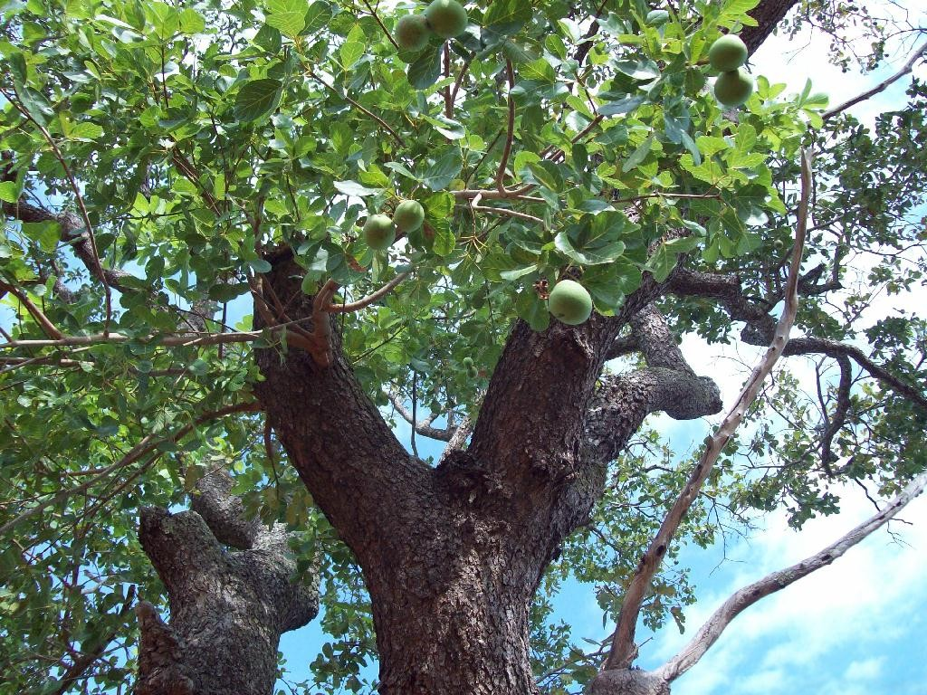 Pequis do cerrado.